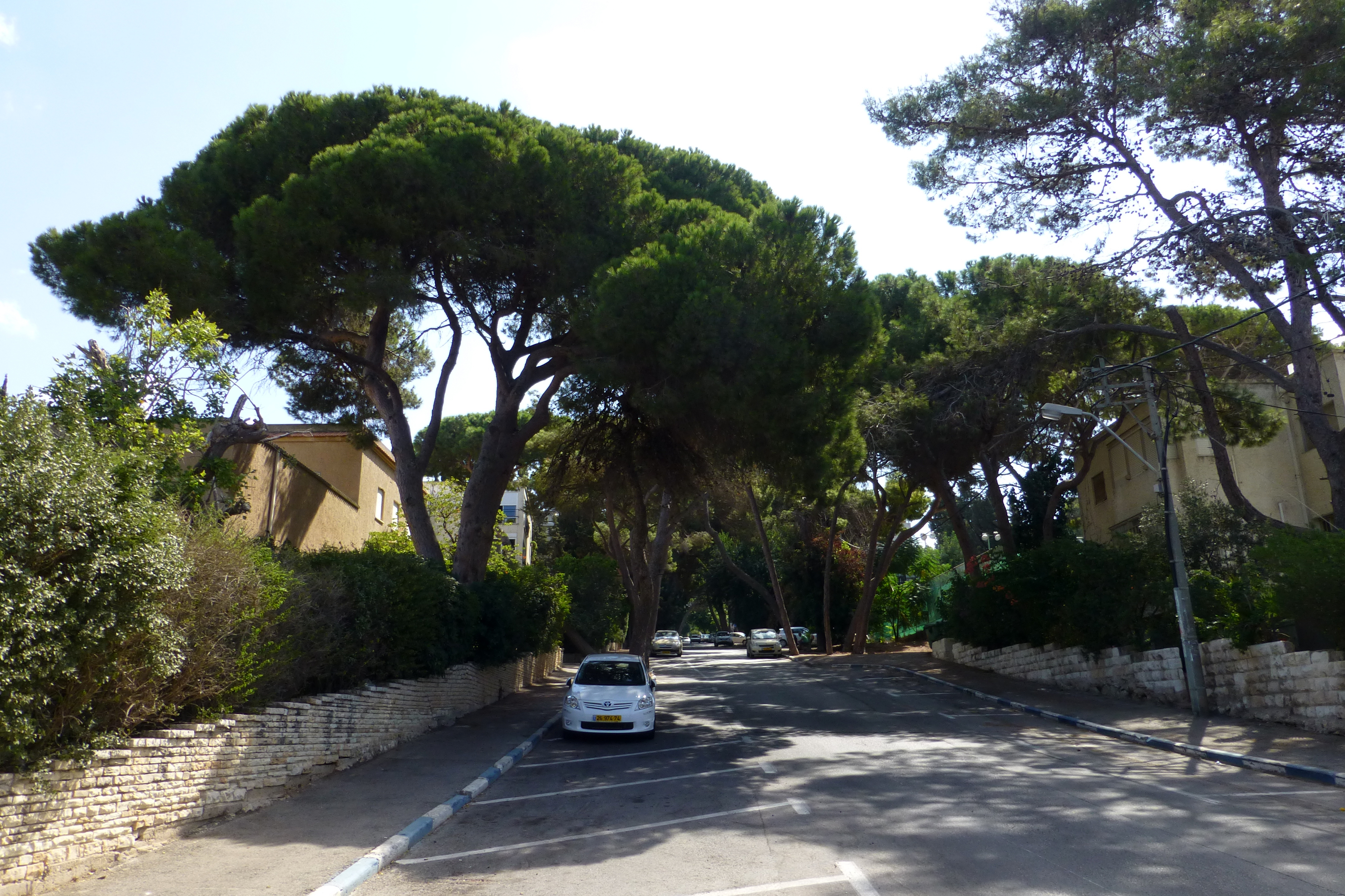 מרכז הכרמל, חיפה כביש, מדרכה ועצים